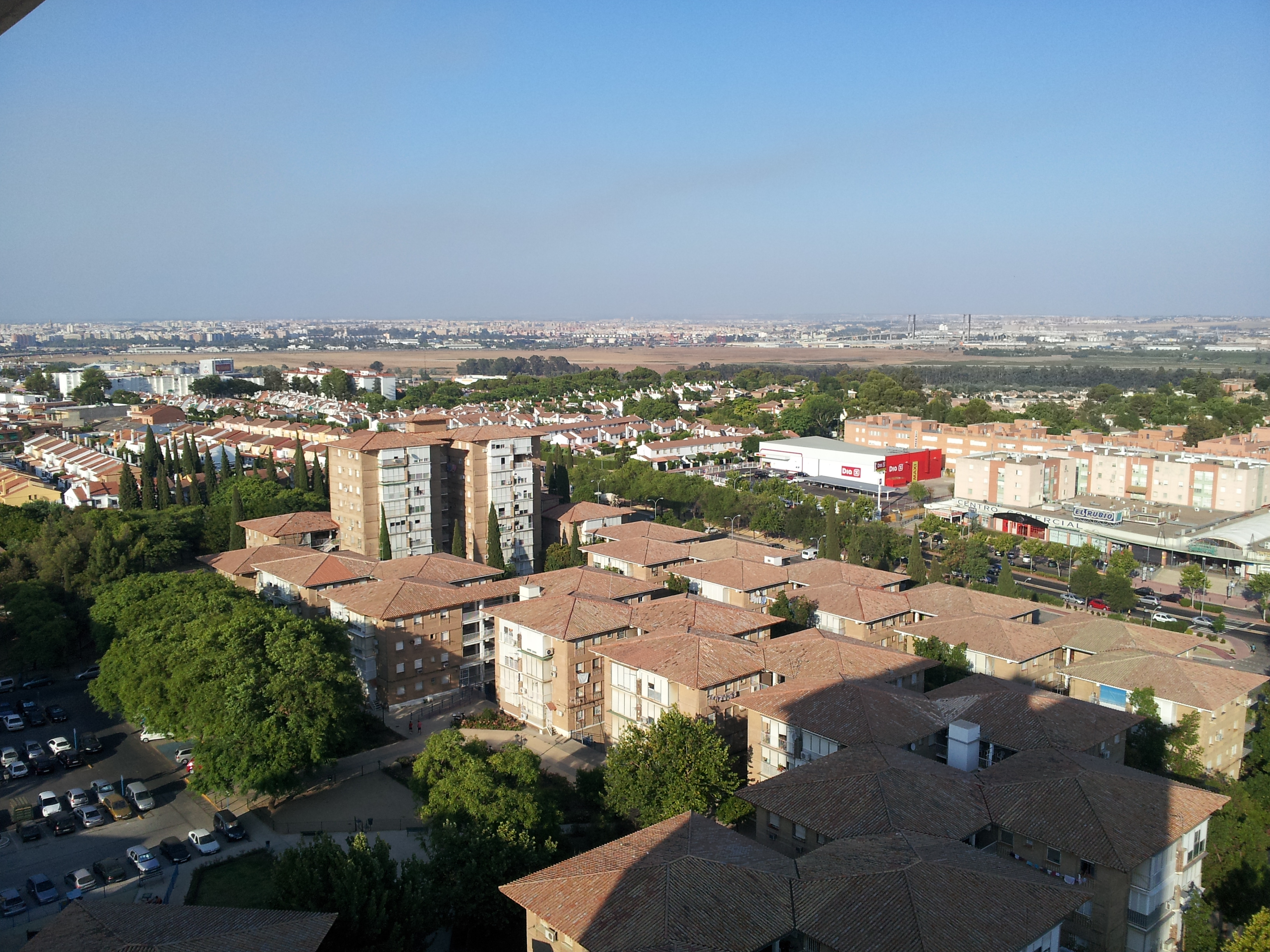 Urbanizaciones Ciudad Aljarafe, Lepanto y Simón Verde de Mairena del Aljarafe Barrio Alto de San Juan y al fondo Seviila (En la cuarta parte derecha, puente del V Centenario), fotografiadas desde la planta 15 del conjunto 16 de Ciudad Aljarafe